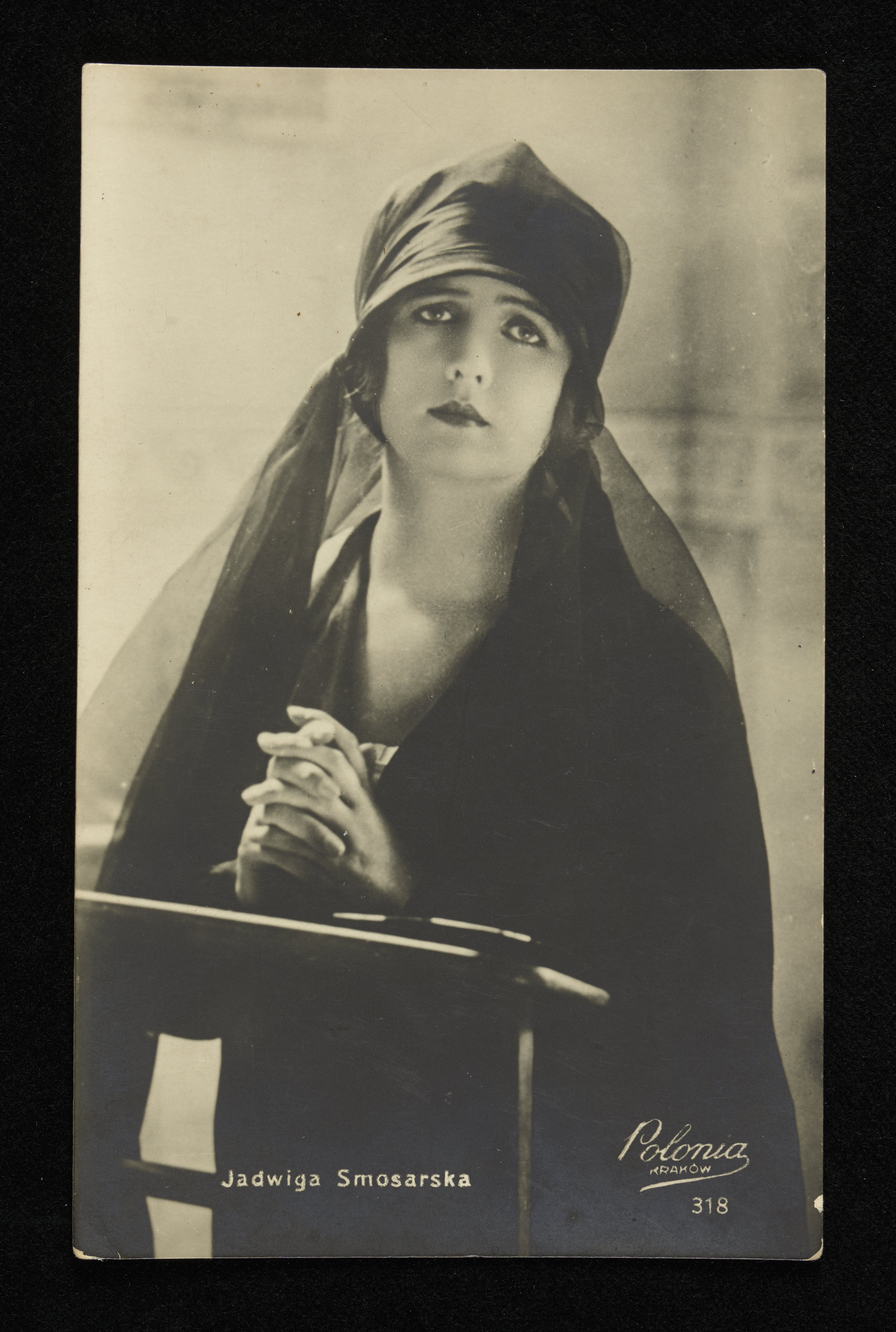 Aktorka Jadwiga Smosarska, wizerunek z pocztówki, 1918-1939 r.